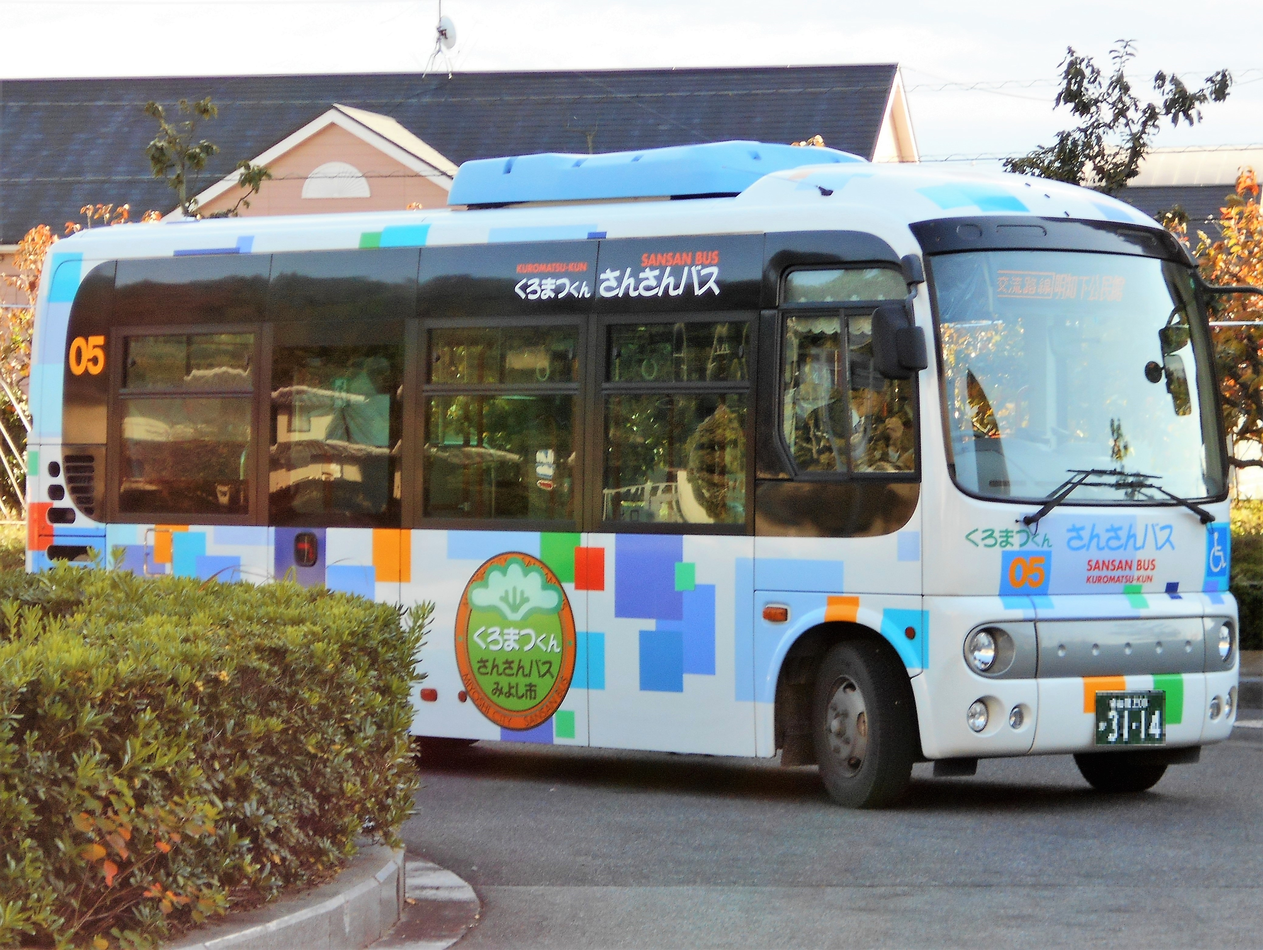 さんさんバス・くろまつくん（交流路線）用車両［愛知県みよし市、黒笹駅にて撮影。2016年11月］